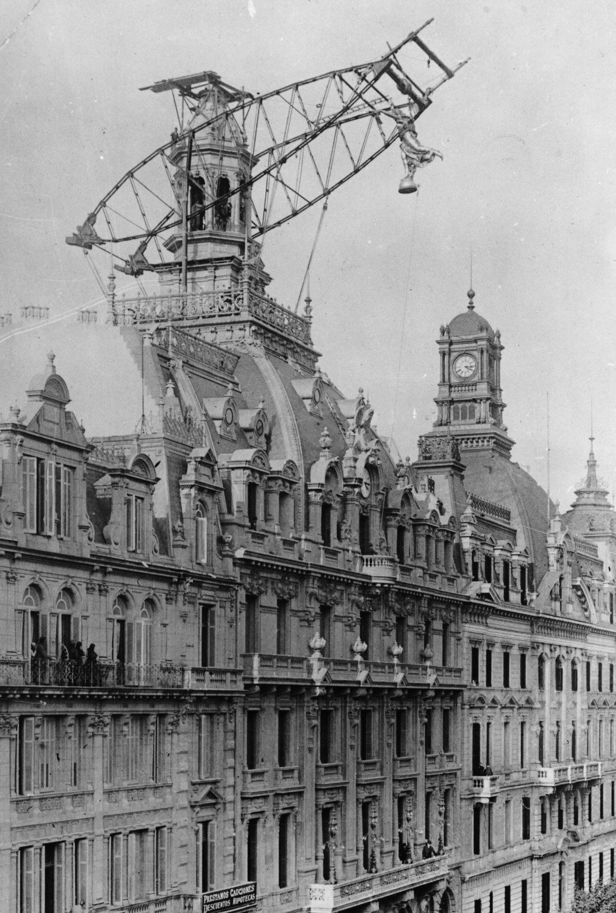 Elevación de la estatua que corona el Edificio del diario La Prensa, hoy Casa de la Cultura de la Ciudad de Buenos Aires, Argentina.